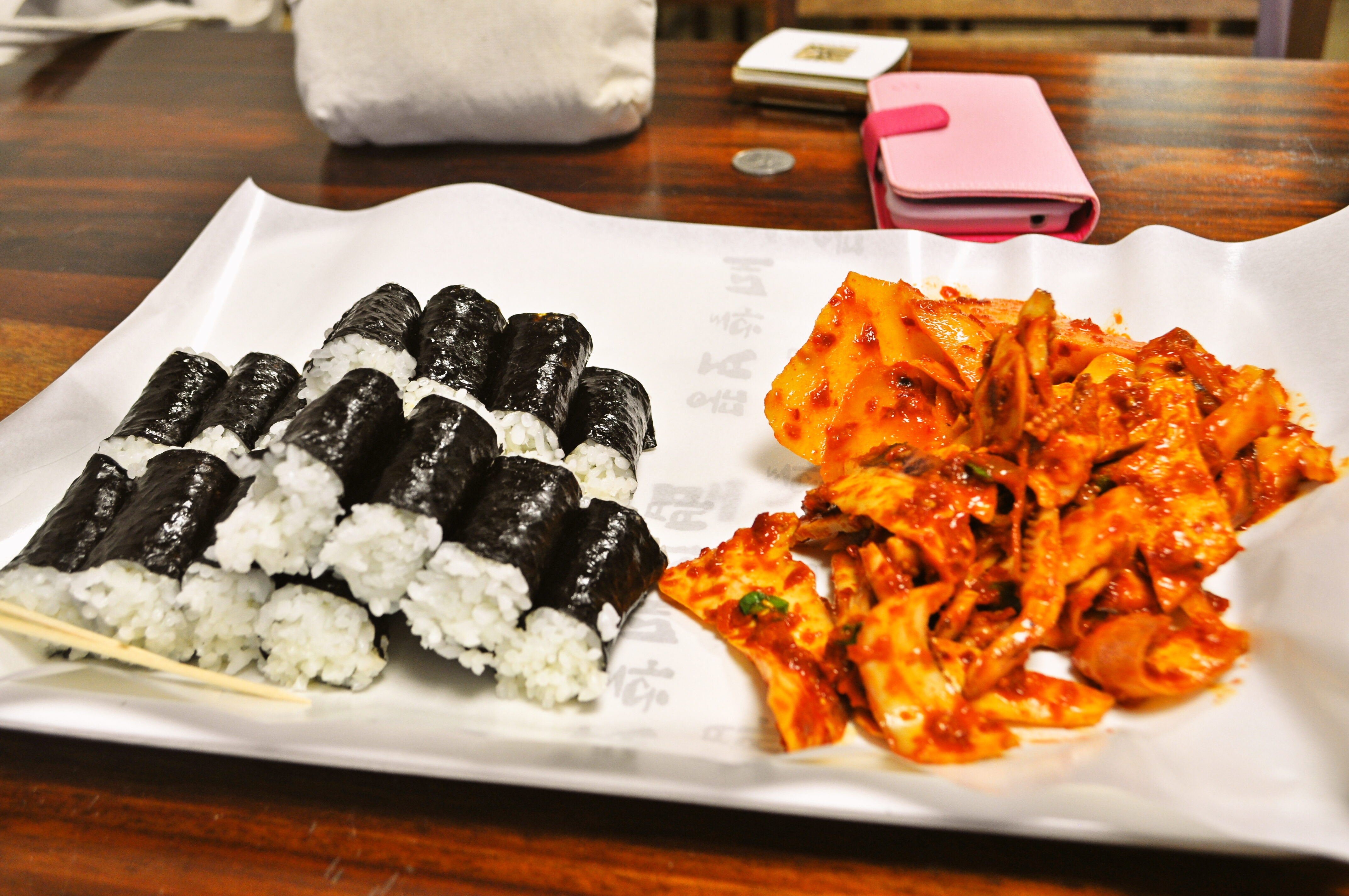 Chungmu gimbab is a Tongyeong's famous food.